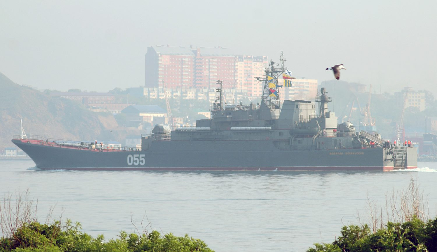 БДК Адмирал Невельской 2014.06.01